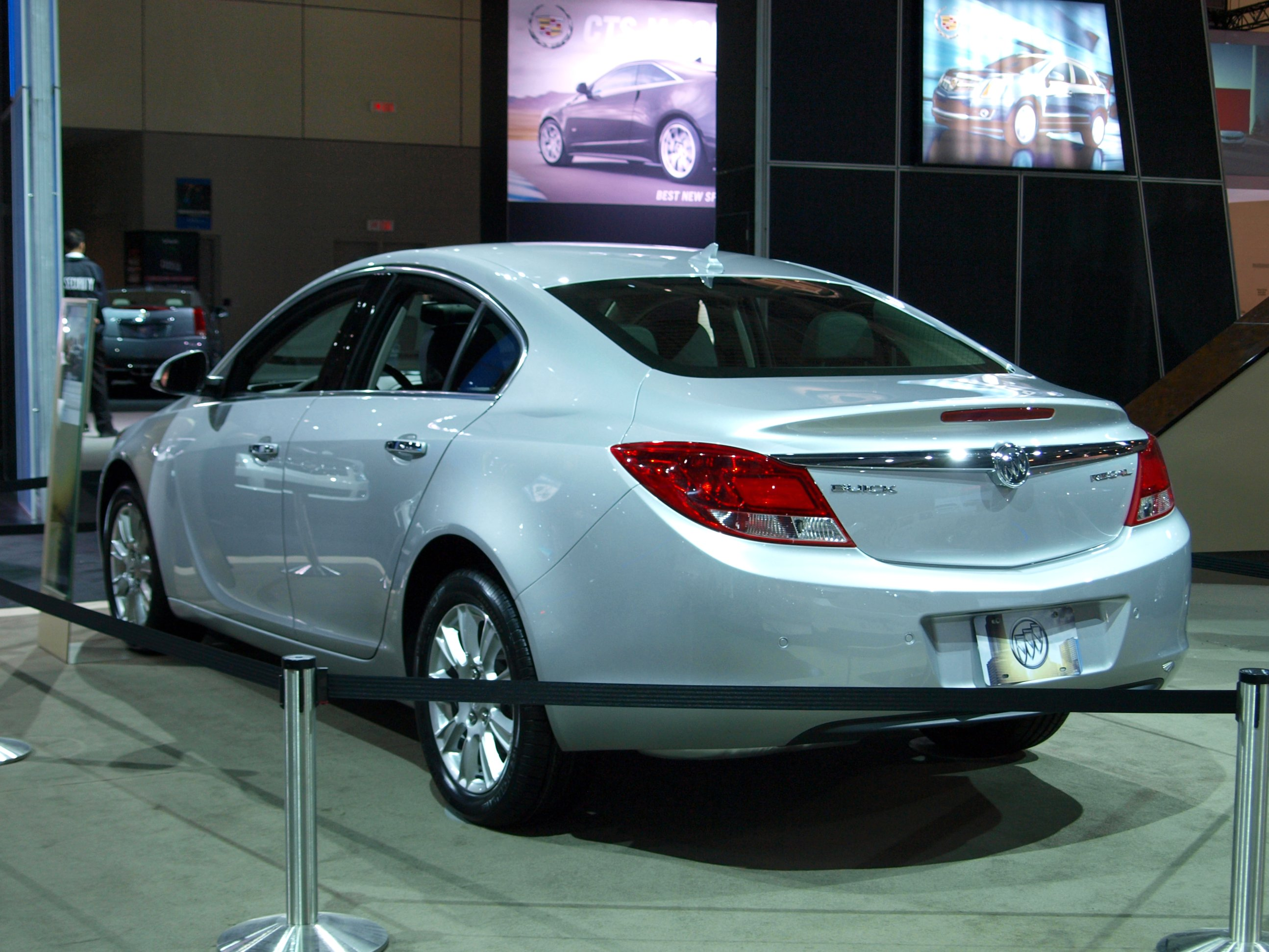 2011 Buick Regal